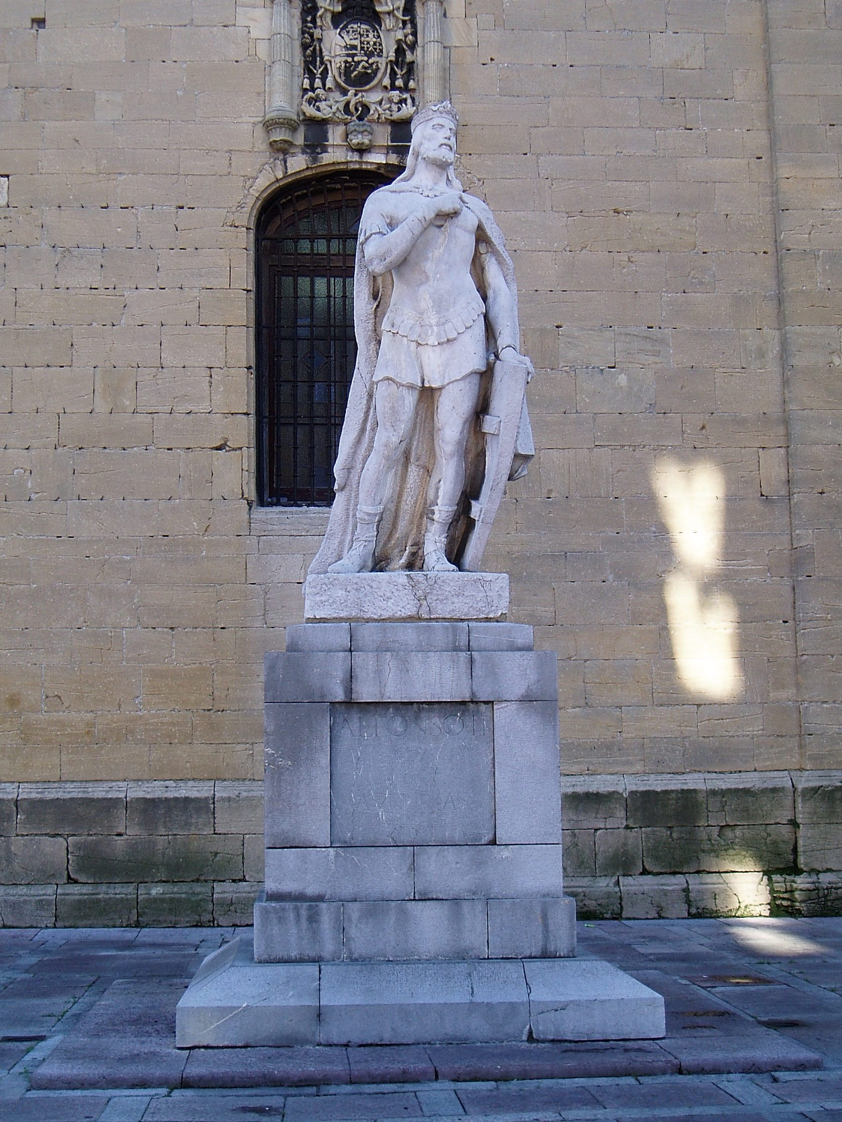 Estatua de Alfonso II el Casto, obra de Víctor Hevia. Situada a un lado del pórtico de la Catedral de Oviedo.